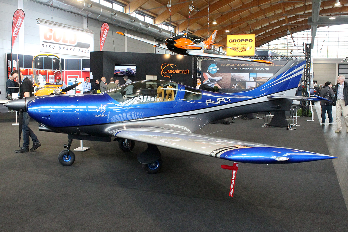 Unknown JMB Aircraft VL-3 @ Friedrichshafen 10/04/2019